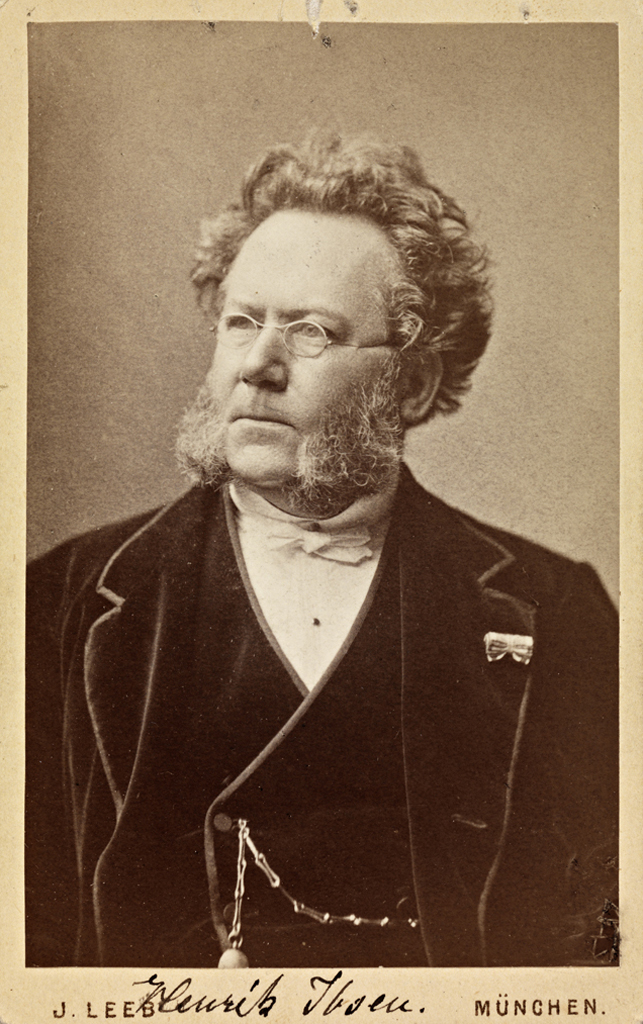 Tittel / Title: Portrett av Henrik Ibsen, 1876 Motiv / Motif: Visittkort / Carte de visite. Dato / Date: 1876 Fotograf / Photographer: J. Leeb (München) Eier / Owner Institution: Nasjonalbiblioteket / National Library of Norway Lenke / Link: Bildesignatur / Image Number: bldsa_ib1a1004